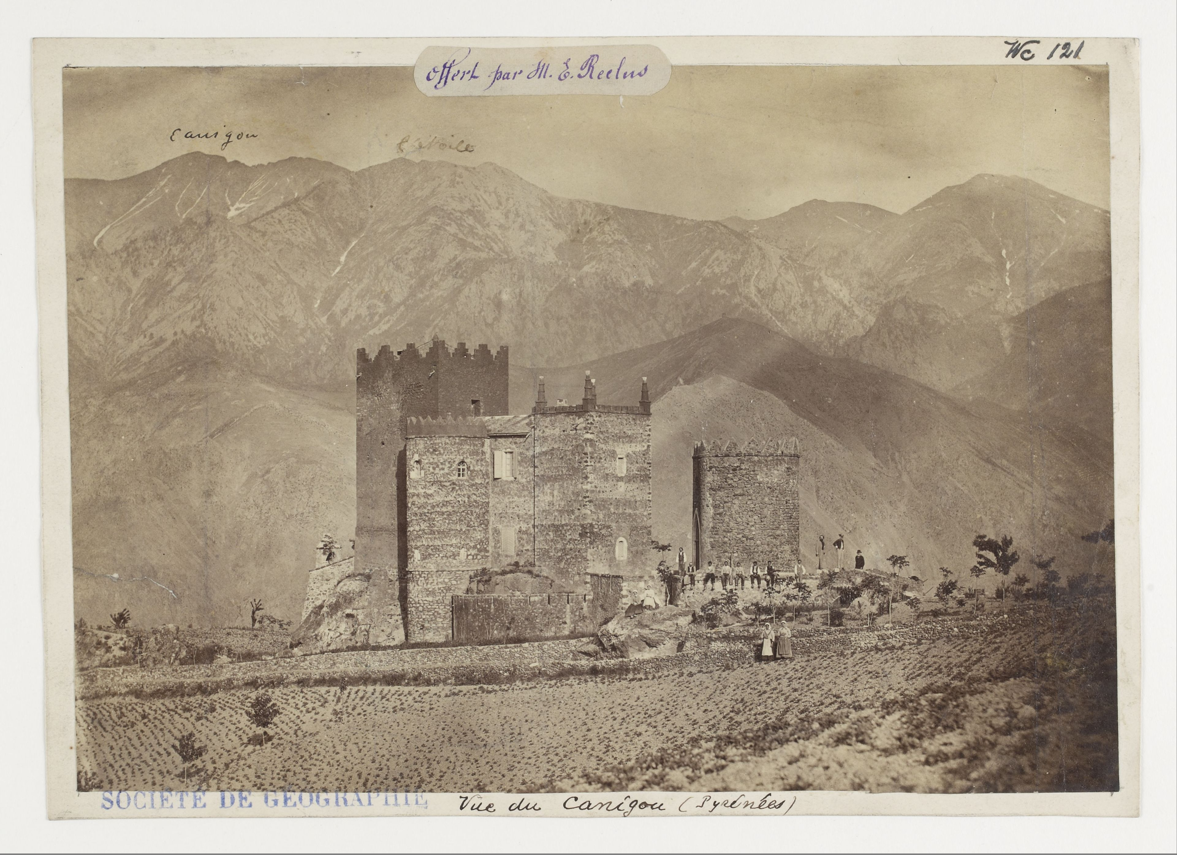 Château de Thorrent et vue du Canigou